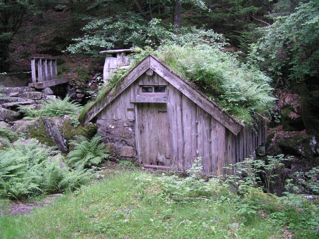 Skvaltkvarnen vid Svalilt norr om Simlångsdalen sedan 1949 tillhörande Breareds kulturhistoriska förening